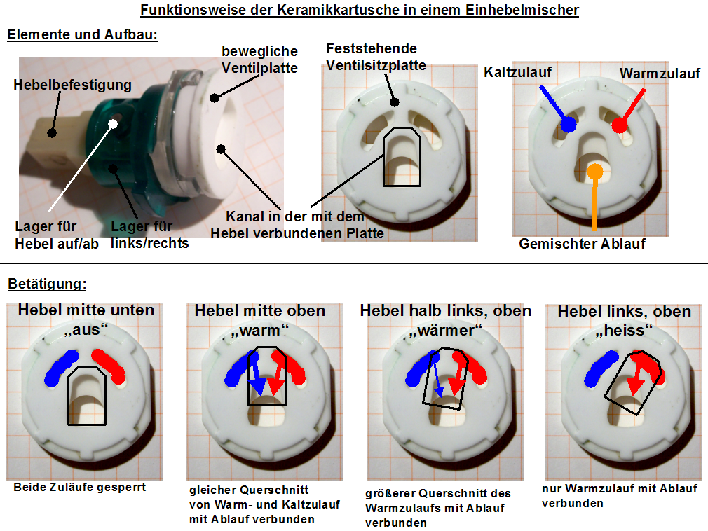 Aufbau und Funktion der Keramik-Kartusche in einem Einhebelmischer